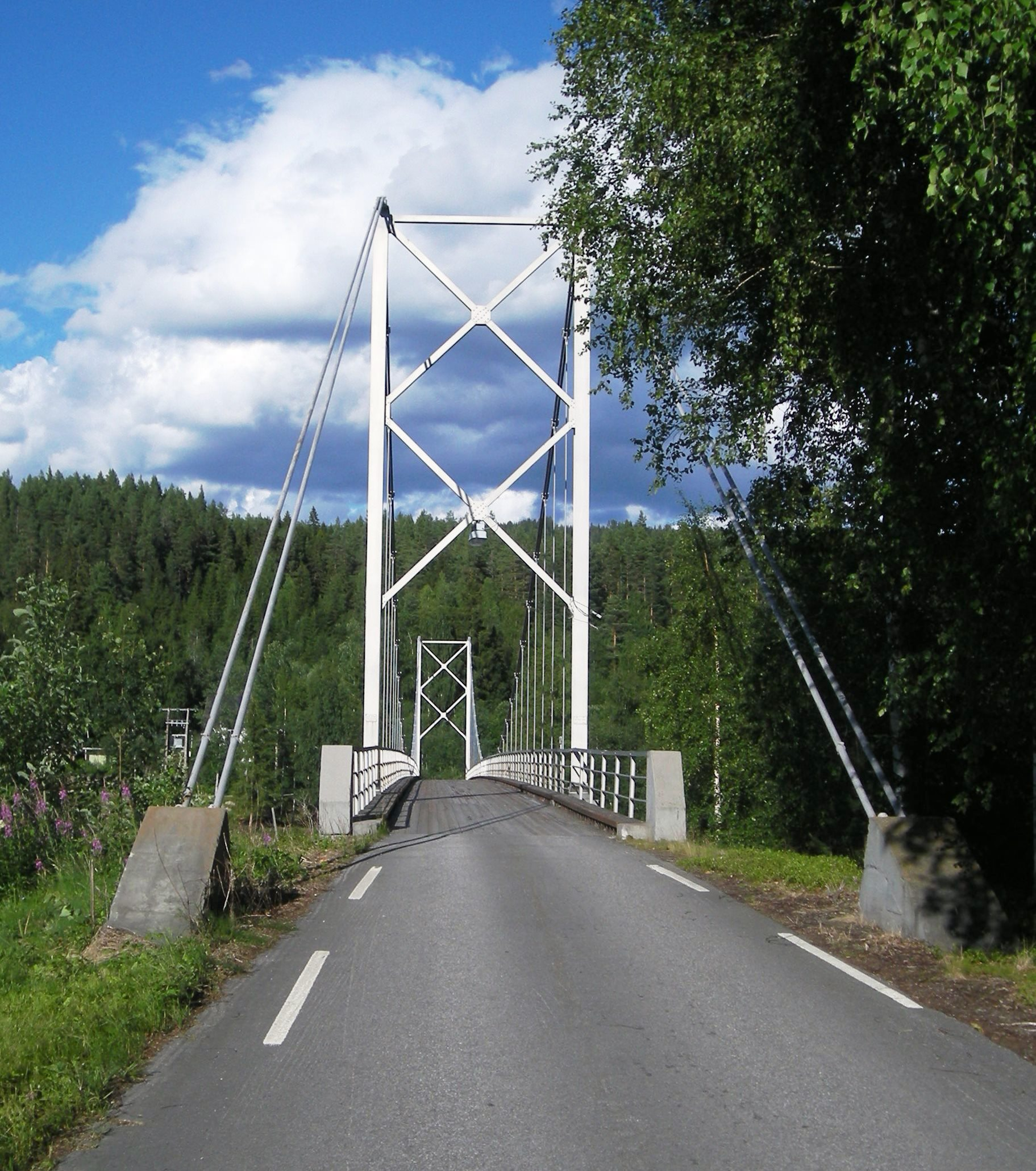 Opphus bru med fylkesvei 631